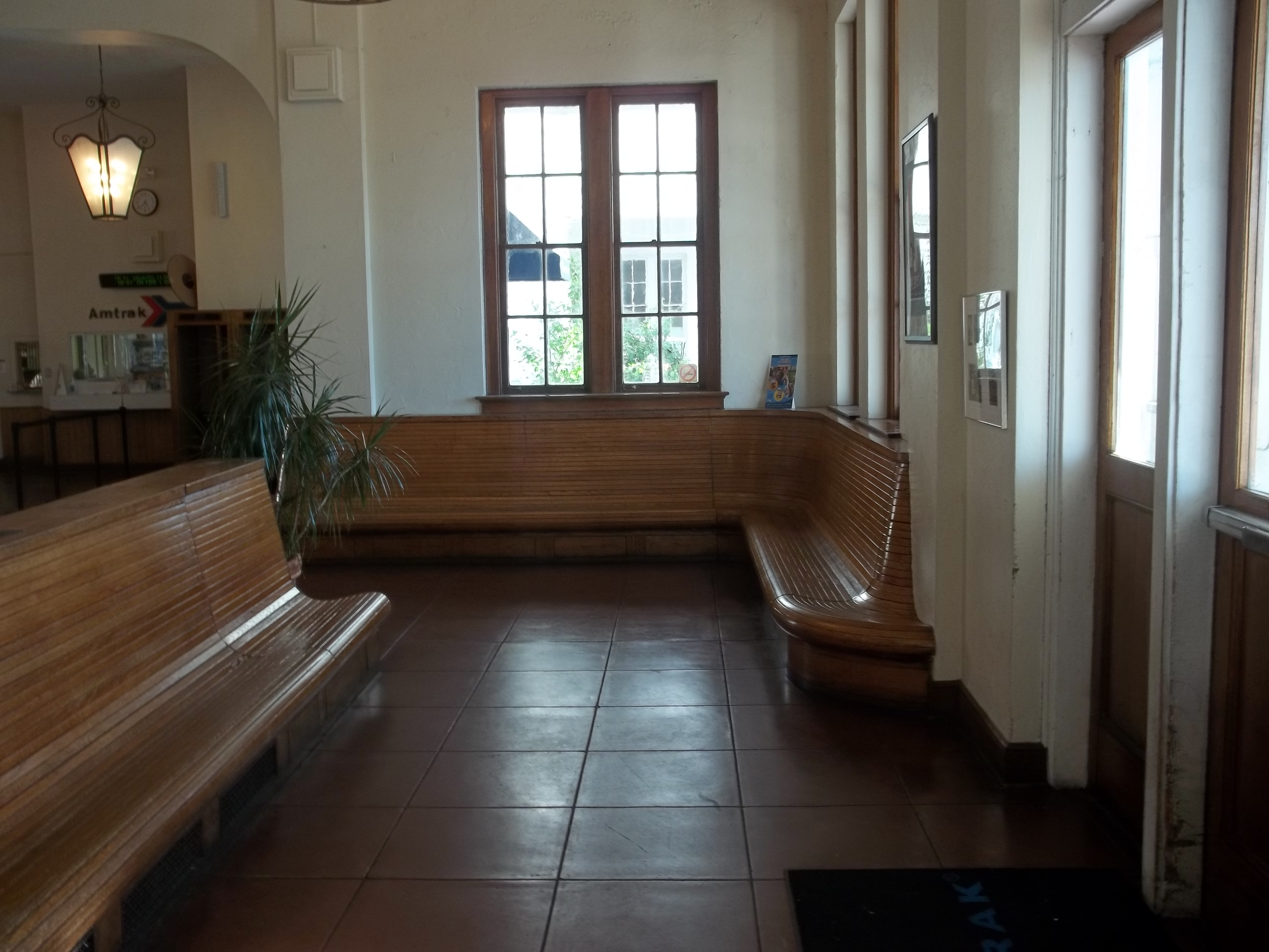 Orlando, Florida: Orlando (Amtrak station)